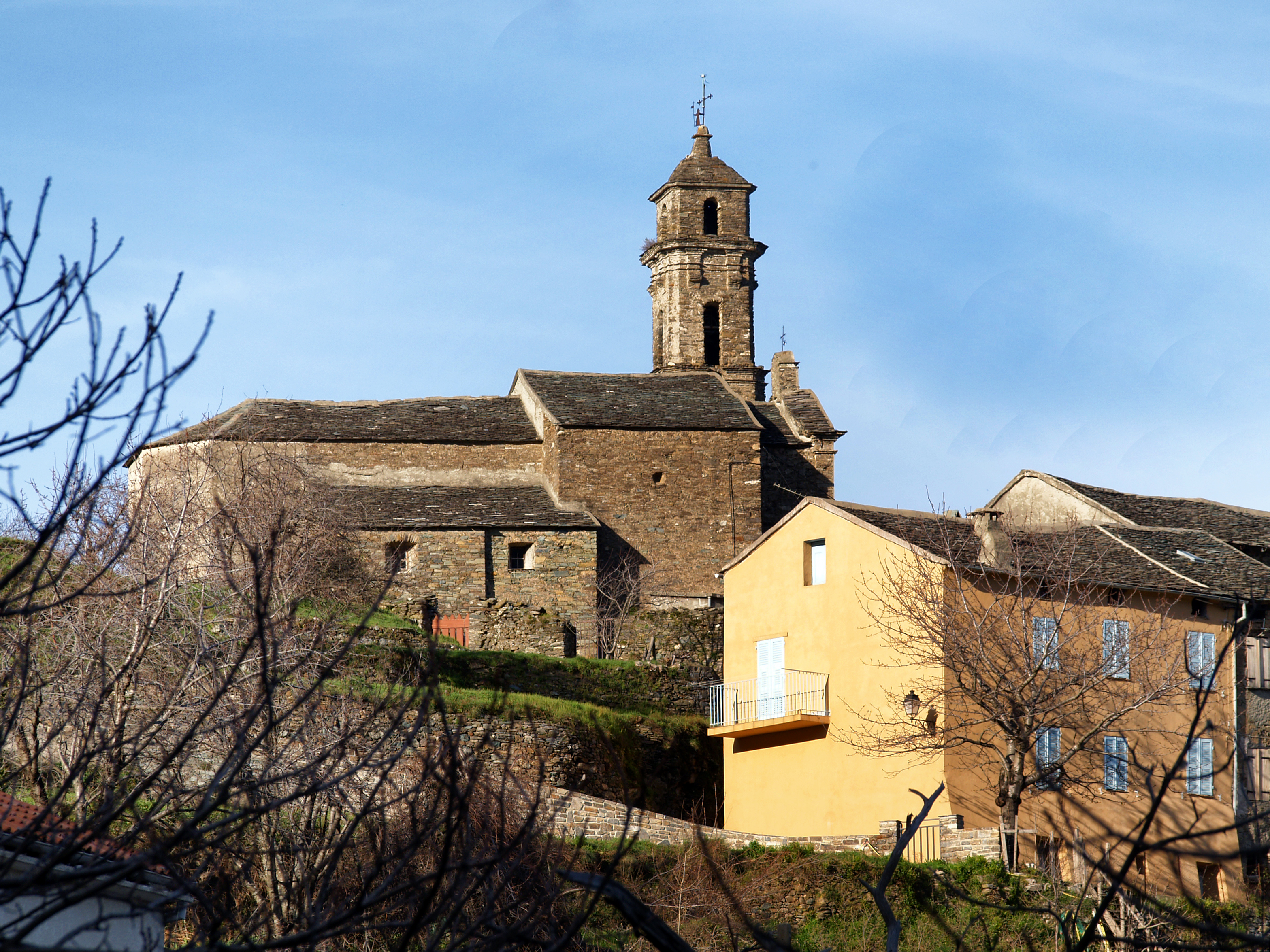 Campana, Castagniccia (Corse) - L'église paroissiale Saint-André